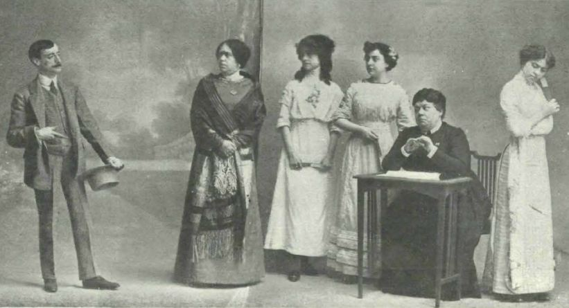 Escena del estreno de la obra de teatro Puebla de las mujeres, de los Hermanos Álvarez Quintero